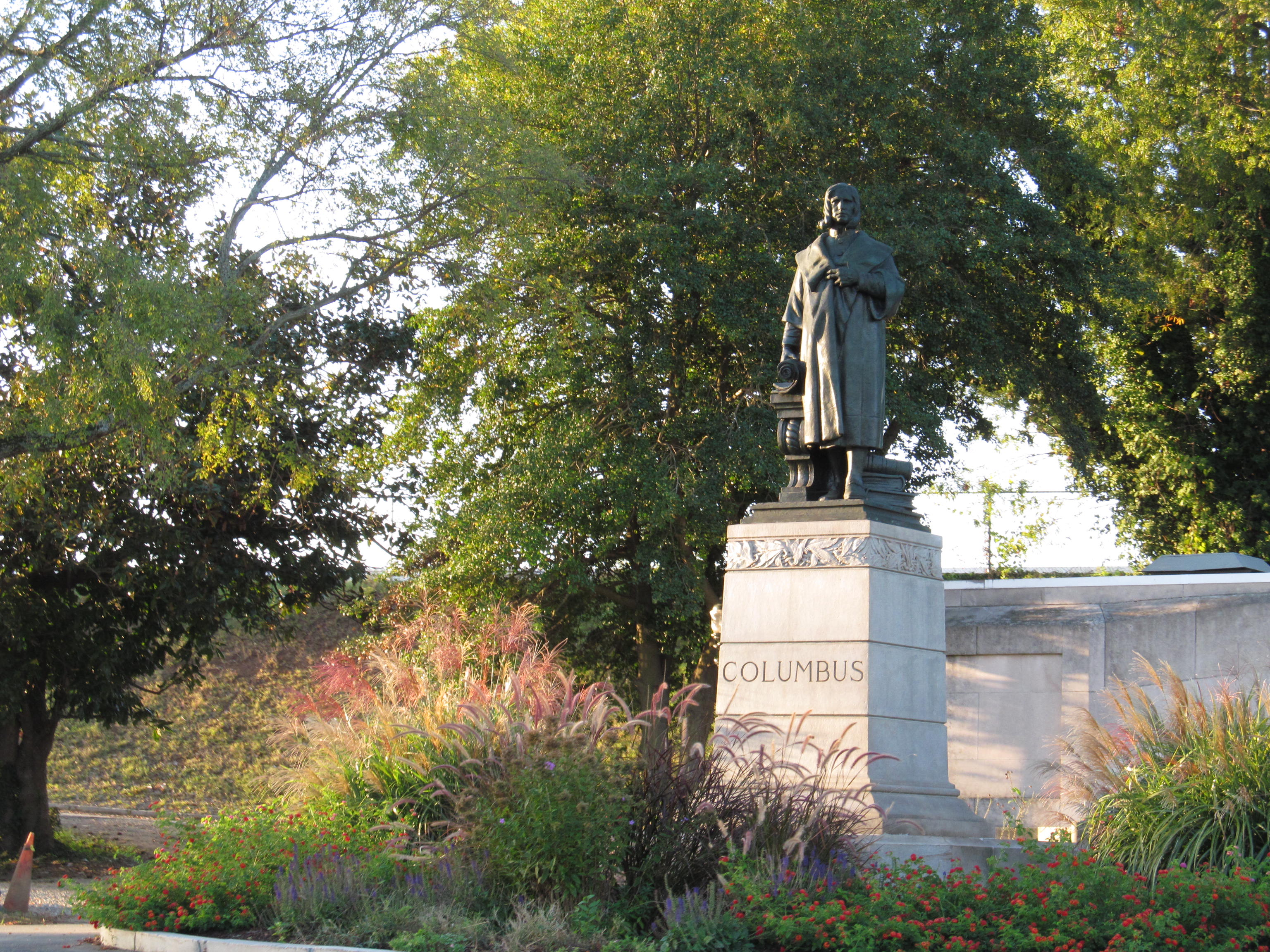 Richmond, Virginia